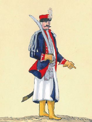 Generał major Luba komendant 4 Brygady Narodowej (Oficer 4 Brygady Kawalerii Narodowej Stanisława Łuby)